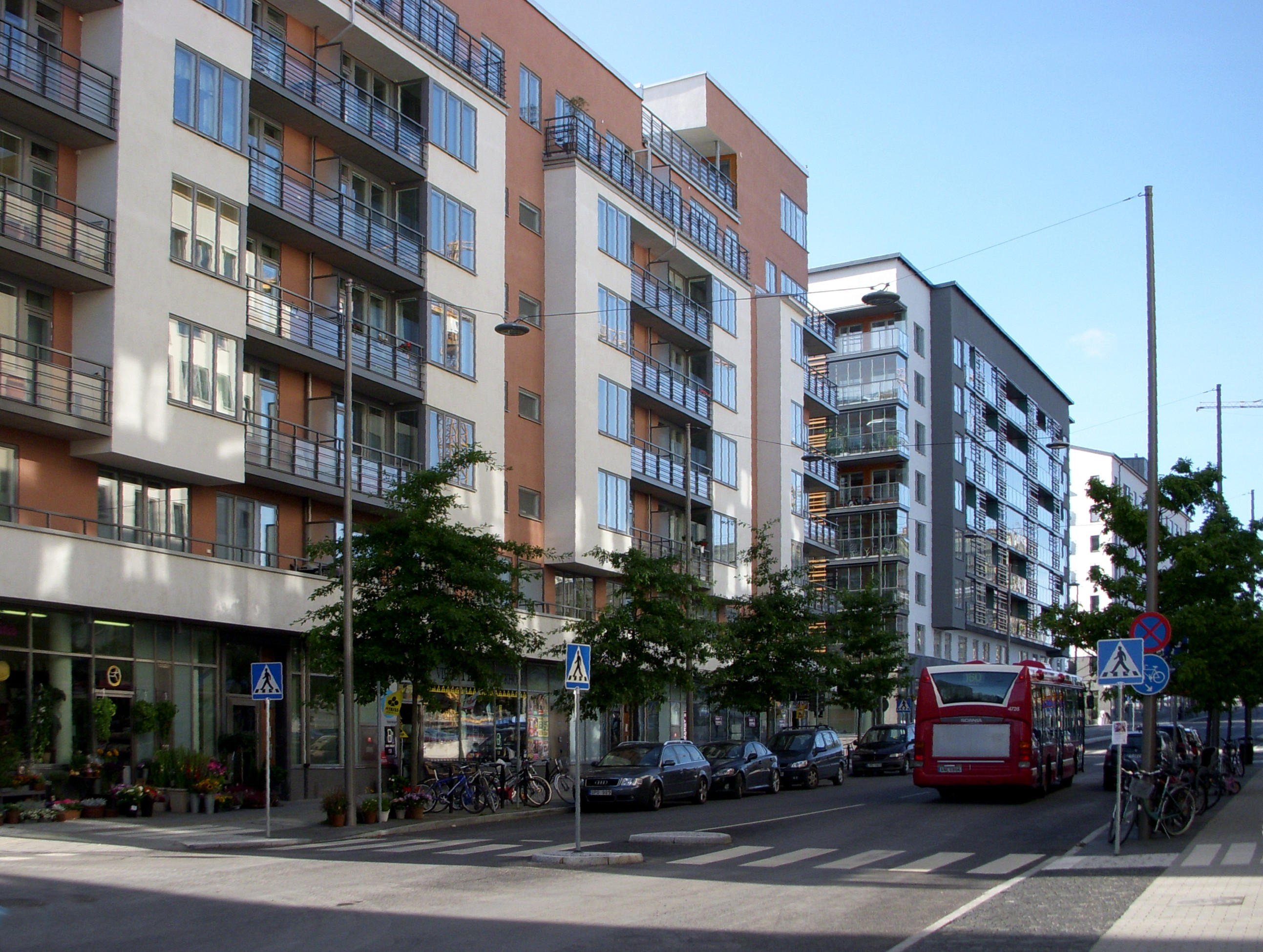 Årstadal, Liljeholmen, Stockholm